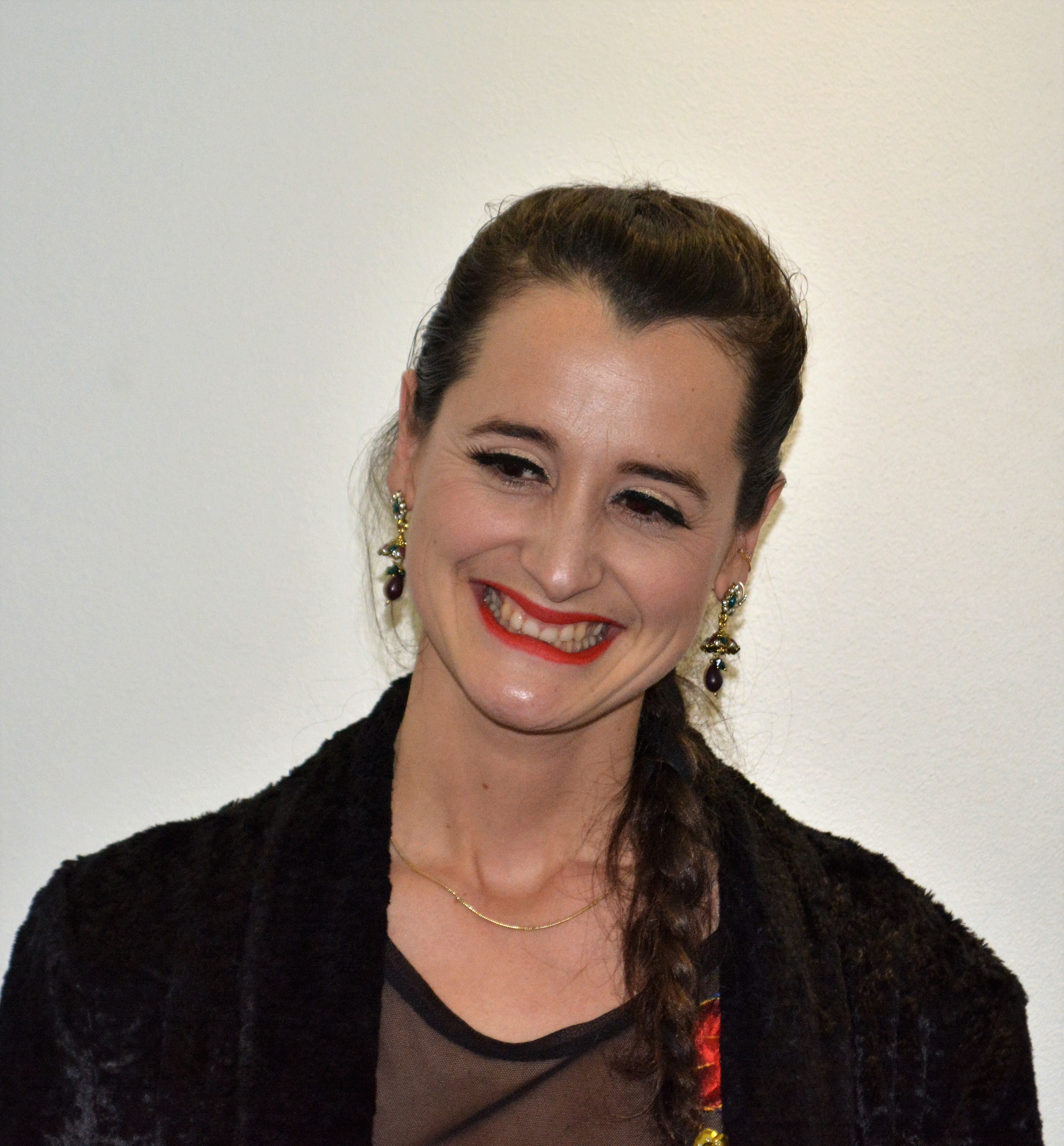 Premios Pulsar 2017